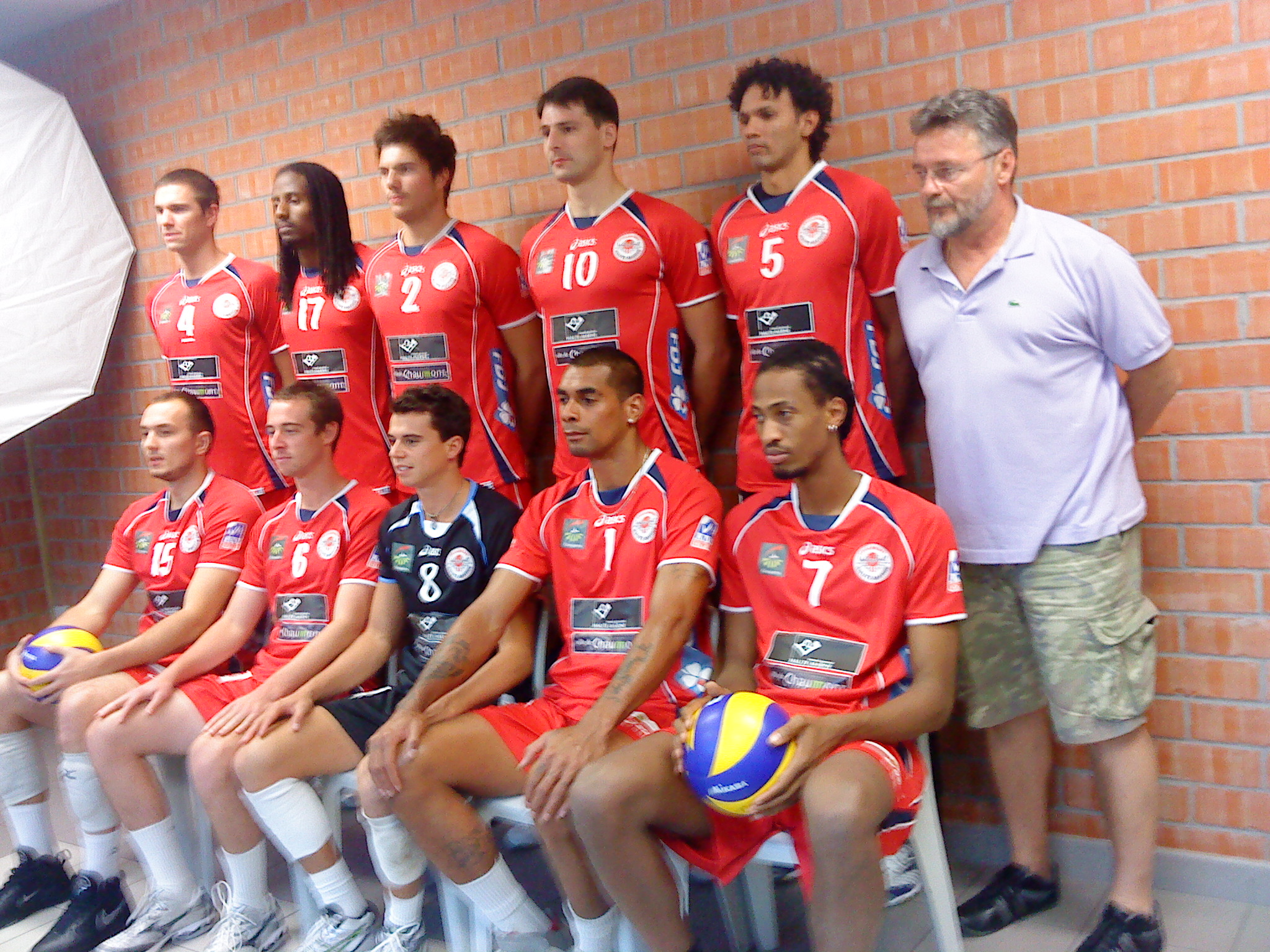 L'équipe de Chaumont Volley-Ball 52 pour la saison 2010-2011.